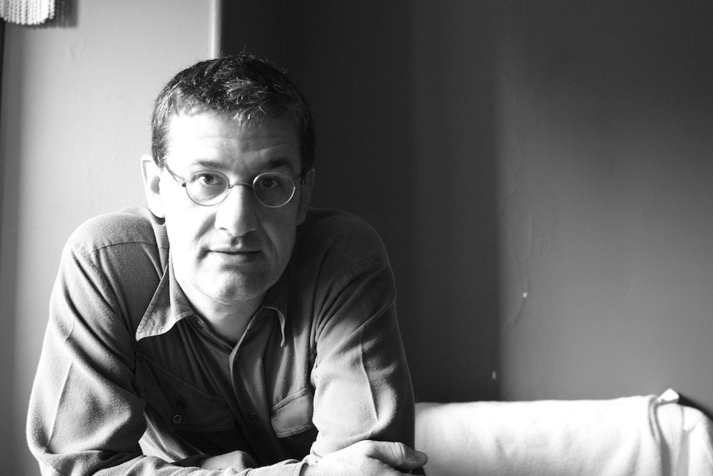 Convegno American Psychoanalytic Association, New York 2012